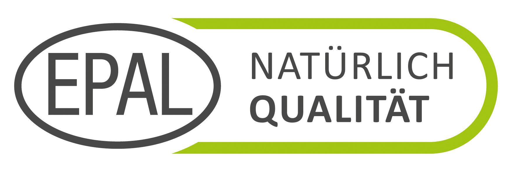 EPAL Natürlich Qualität